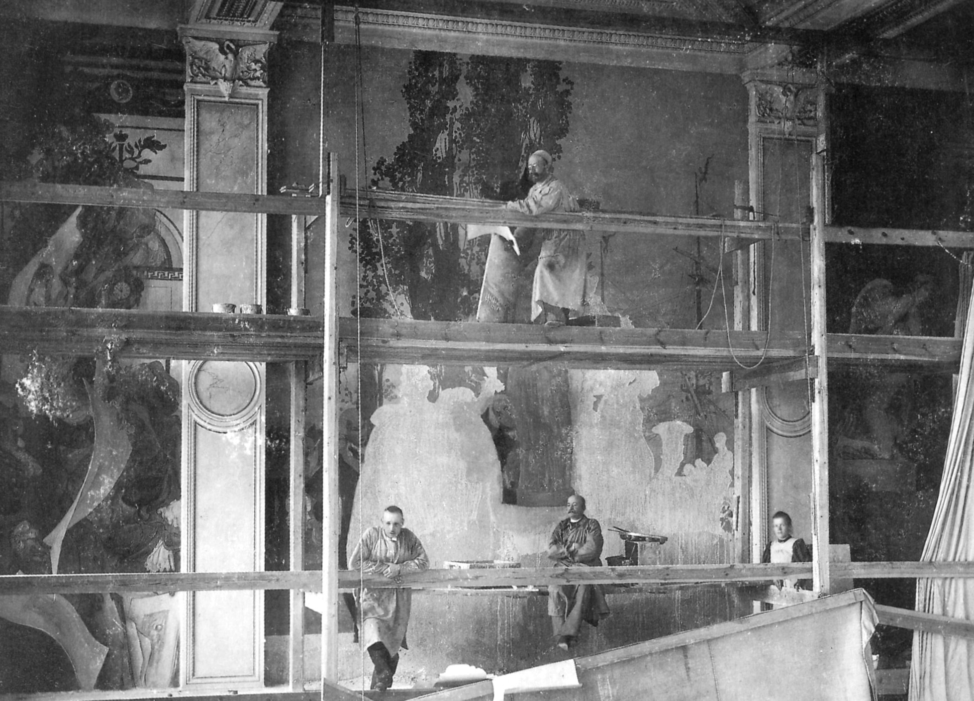 Carl Larsson vid målningsarbetena i nedre trapphallen i Nationalmuseum, Stockholm